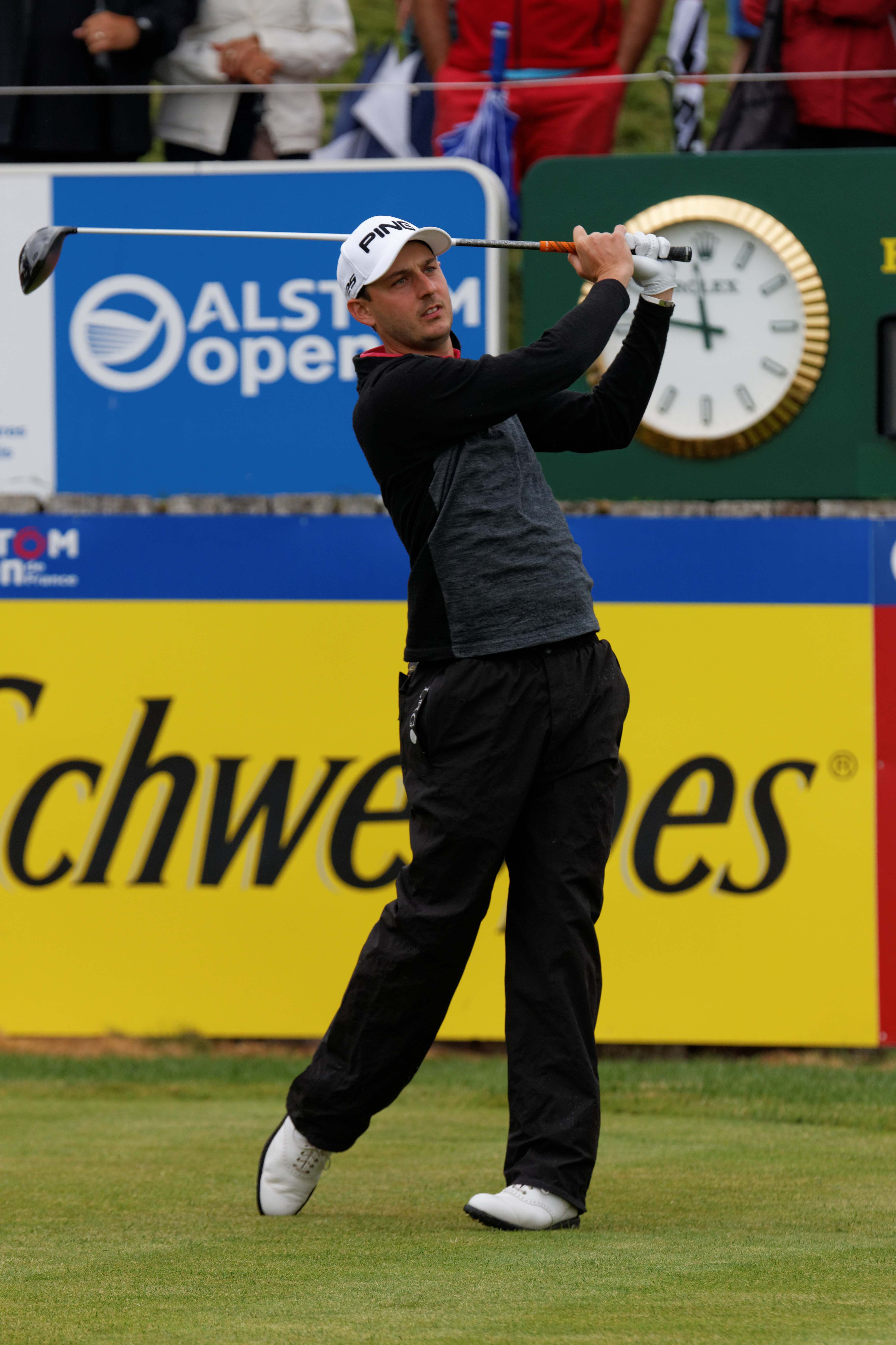 Matthew Nixon lors du quatrième tour de l'Open de France 2014 - Golf National - Saint-Quentin-en-Yvelines (78) - départ du trou n° 1